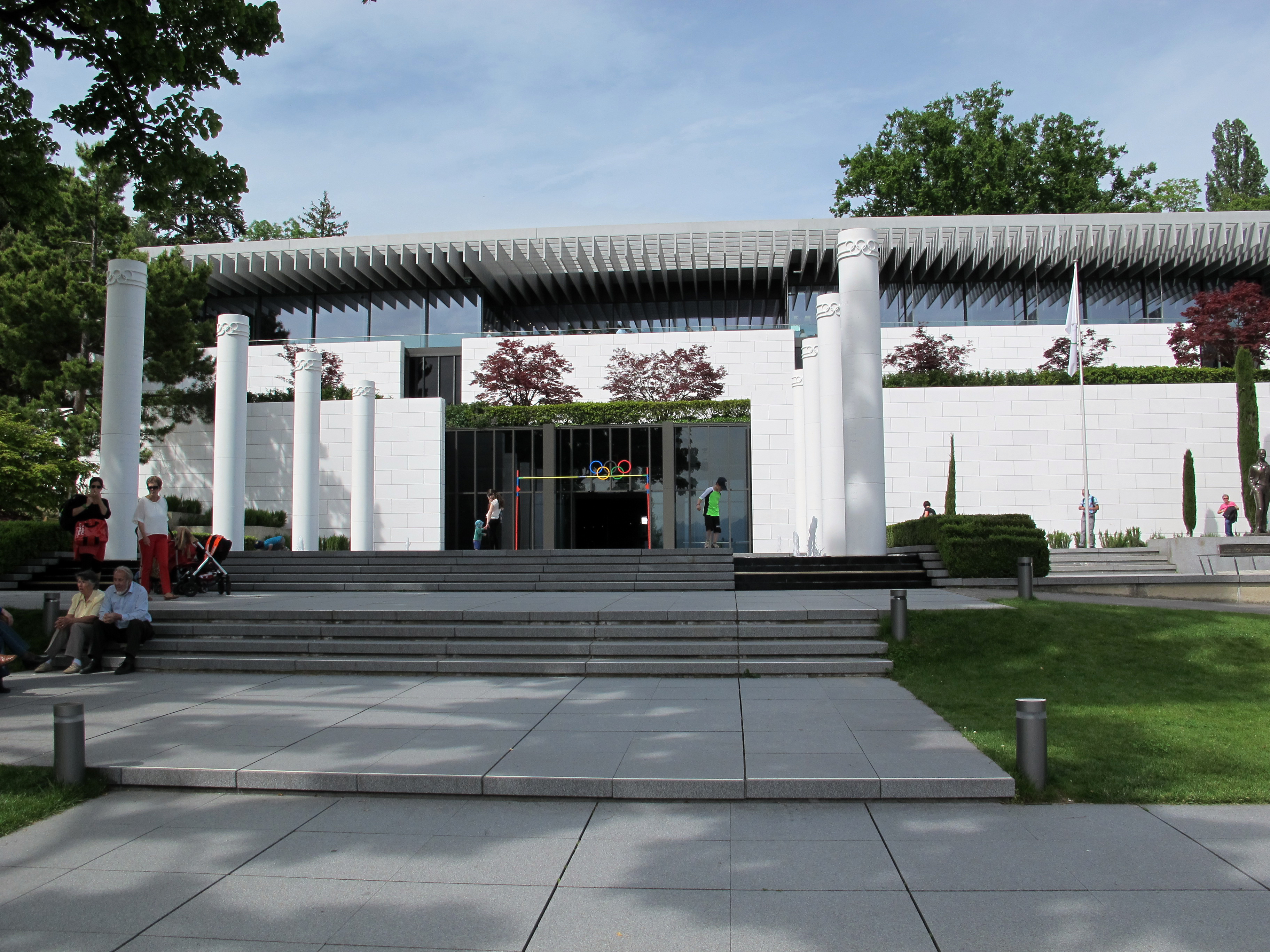 Musée Olympique, Losanna